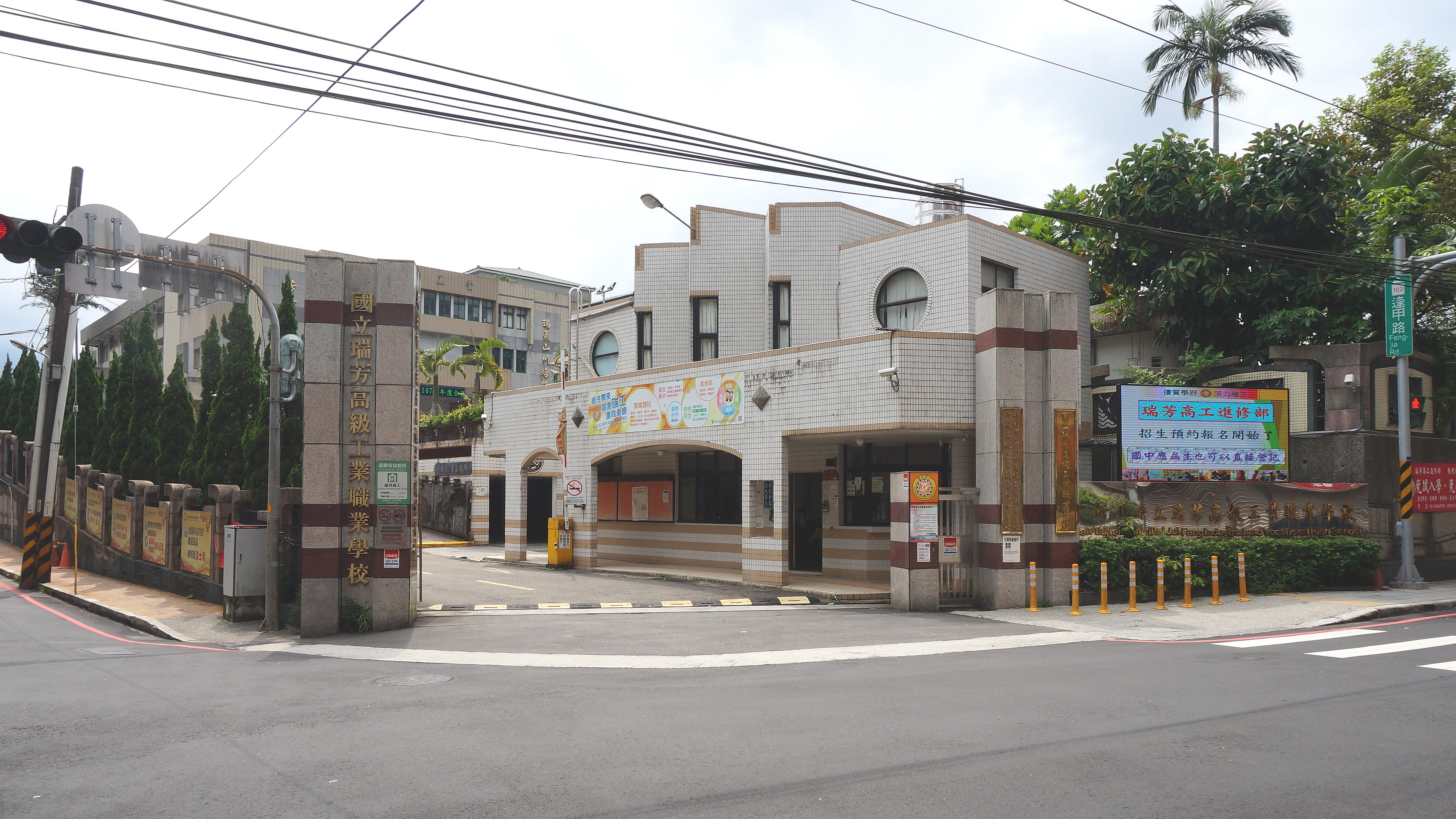 新北市立瑞芳高級工業職業學校大門。